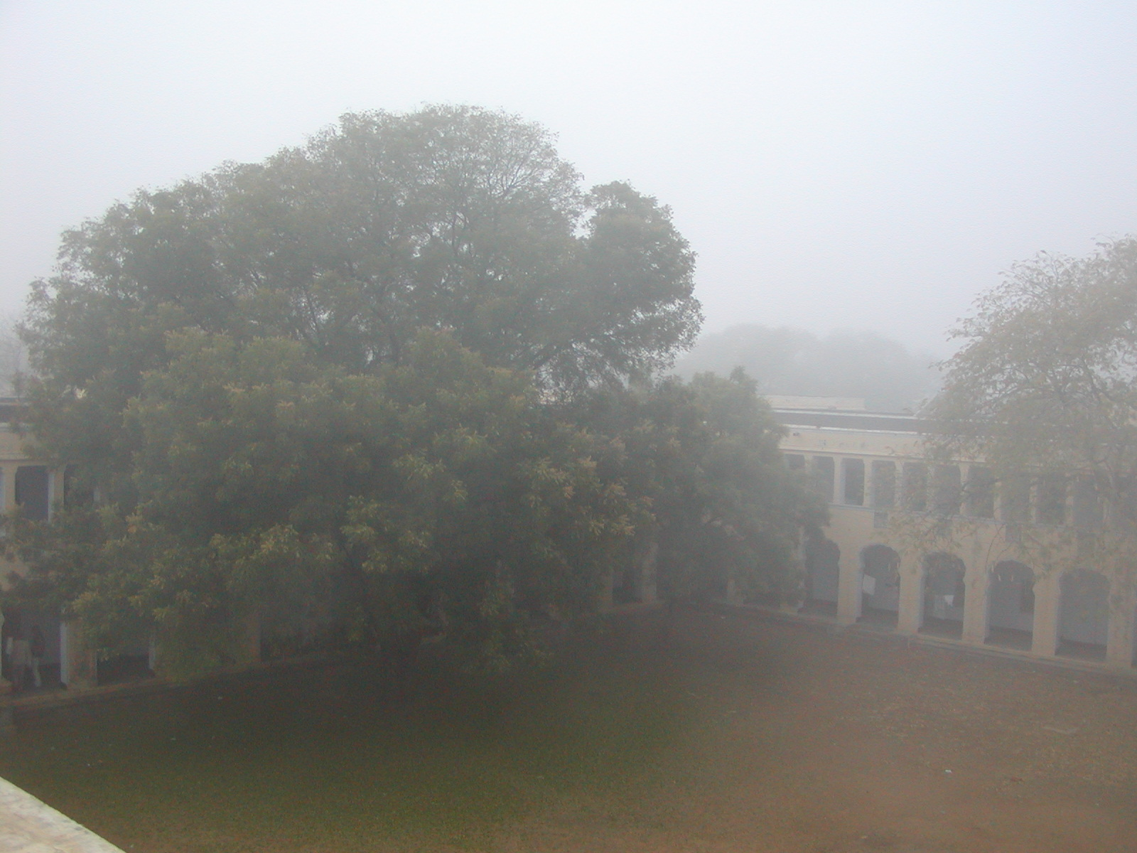 Hostel in BITS Pilani